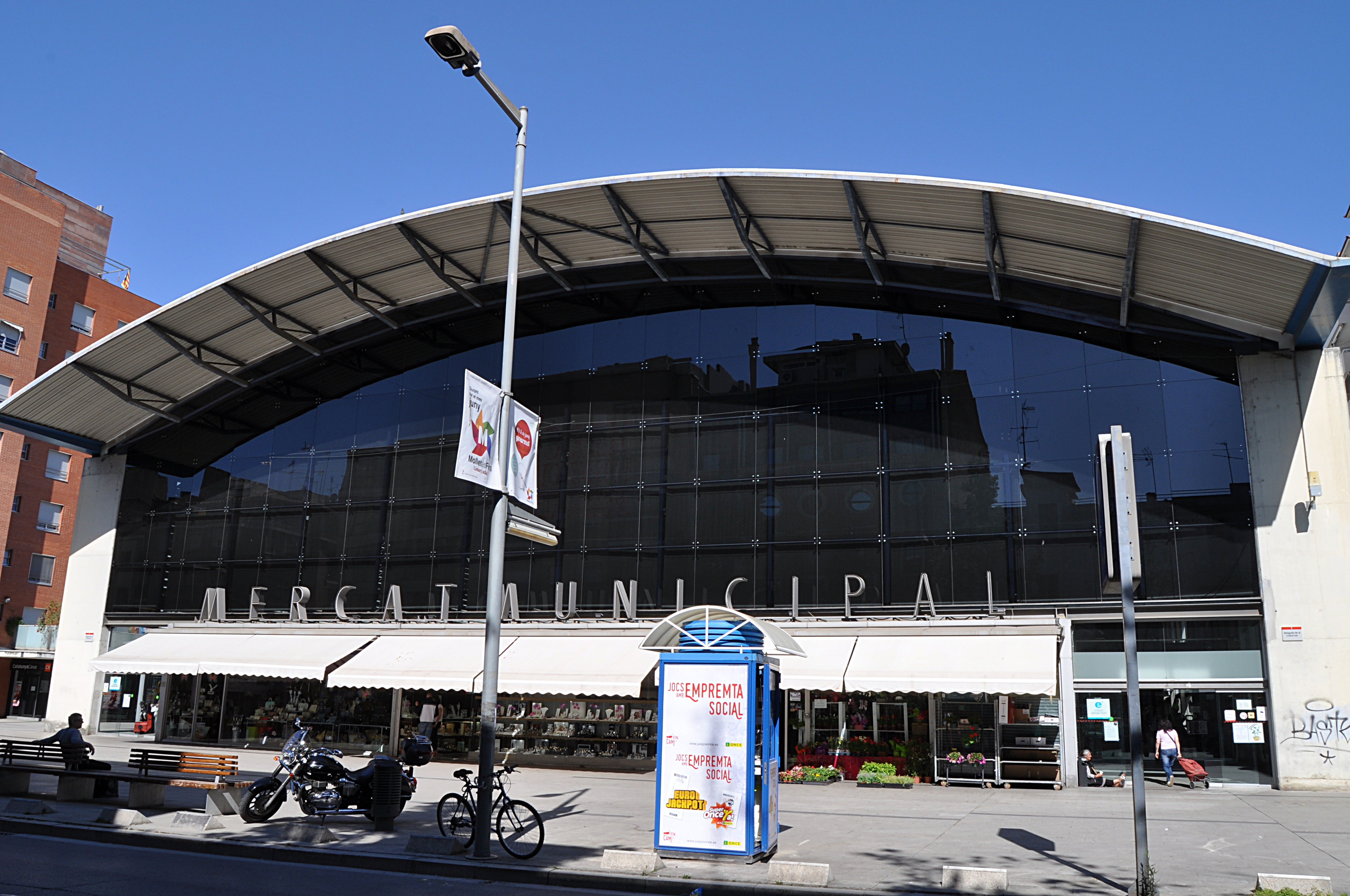 Mollet del Vallès: Mercat municipal a l'Avinguda Llibertat.